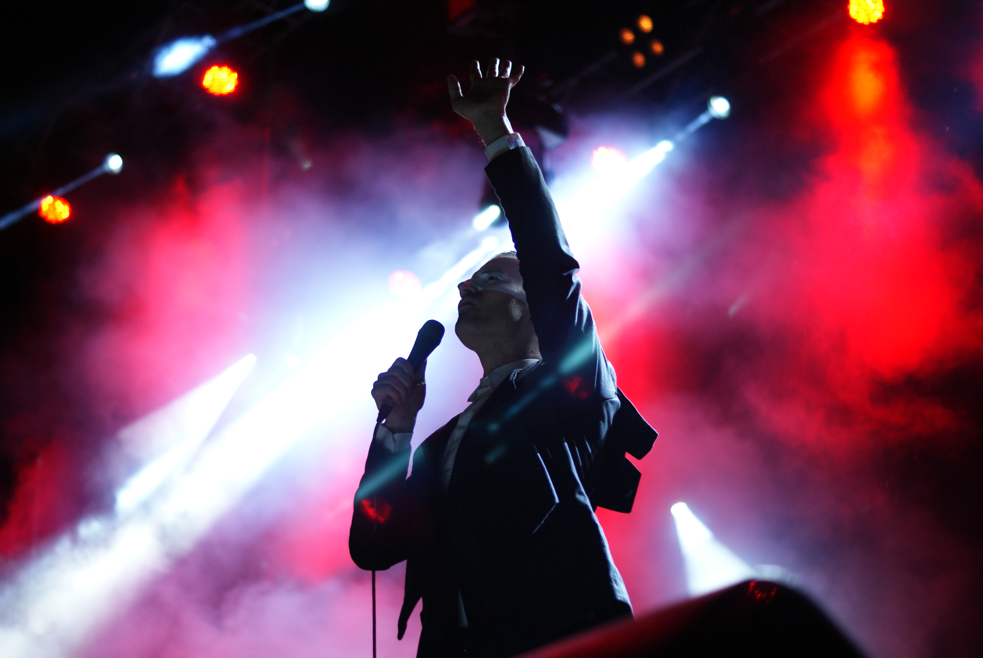 El grupo Monarchy en el festival Palencia Sonora 2016.